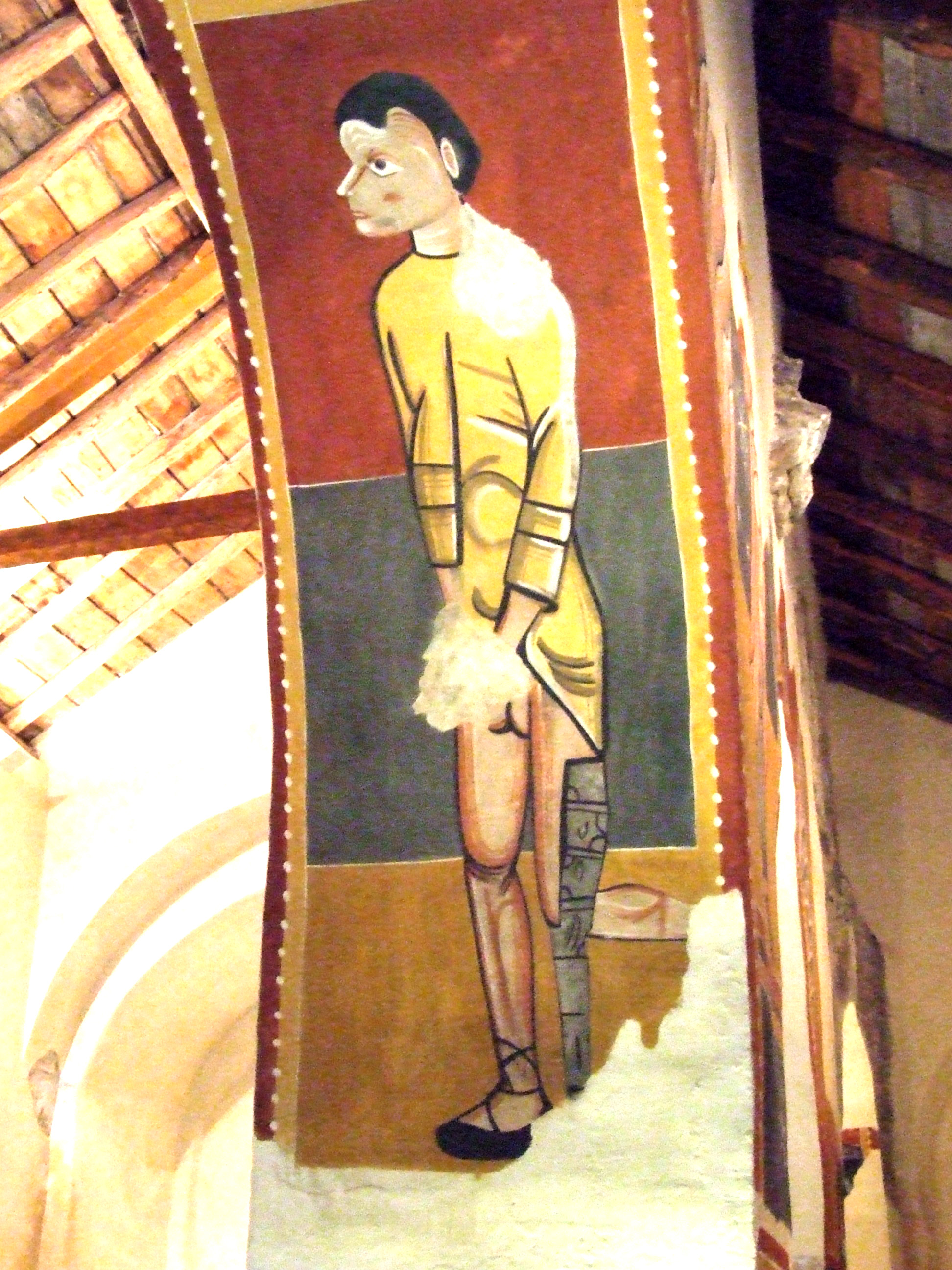 L'esguerrat de Sant Joan de Boí (Vall de Boí, Alta Ribagorça)